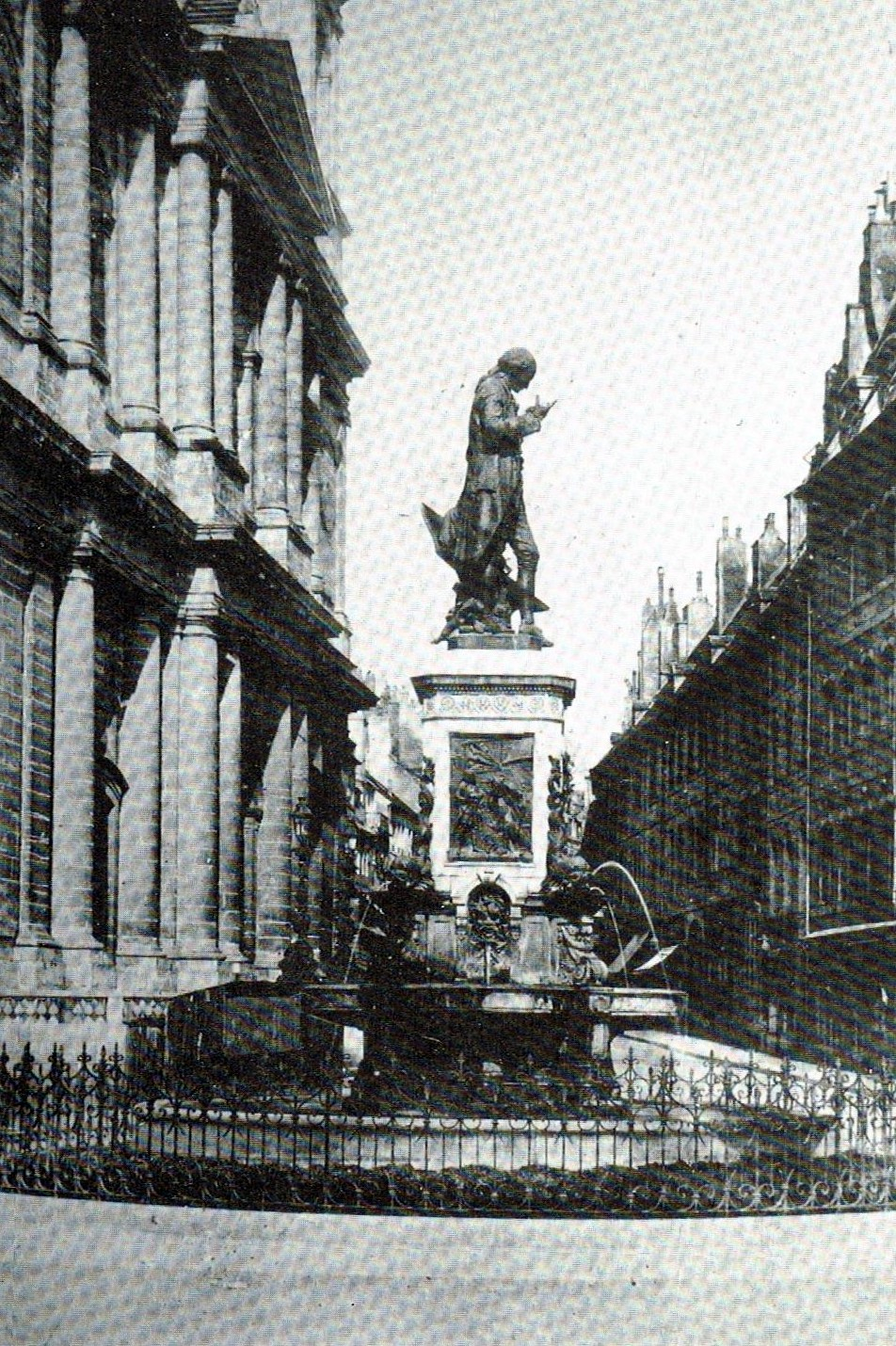 Statue et fontaine de la Madeleine à Besançon, début XXe.